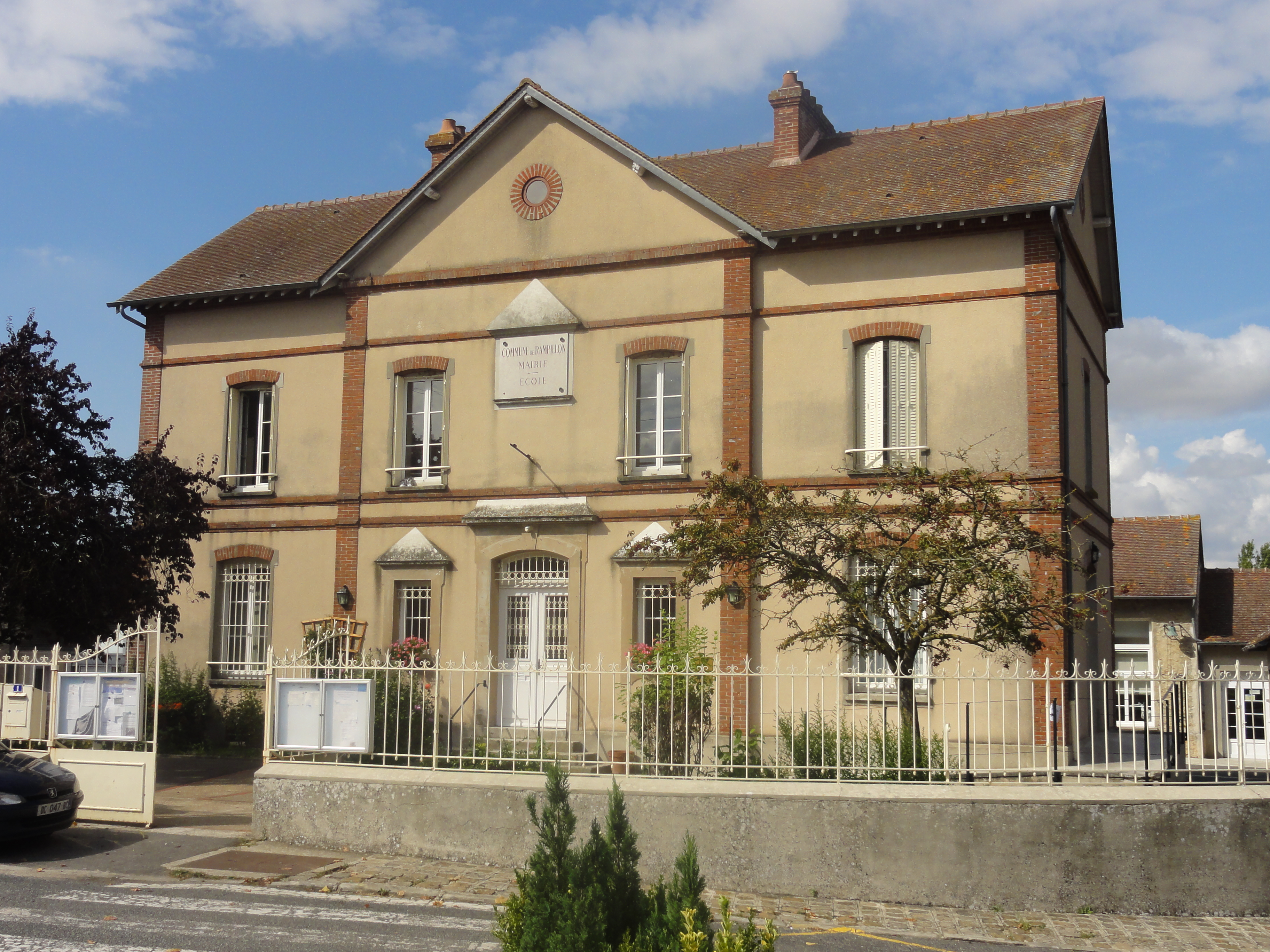 La mairie.